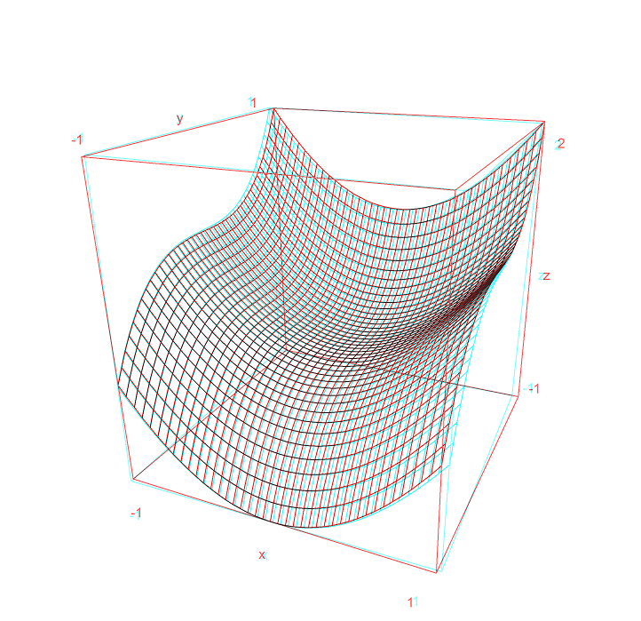 Example anaglyph image z(x,y)=x2+y3.